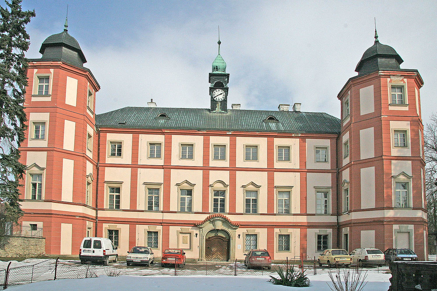 Schloss Zámrsk, Pardubice Region, district Ústí nad Orlicí autor: Prazak date: 2. 3. 2006